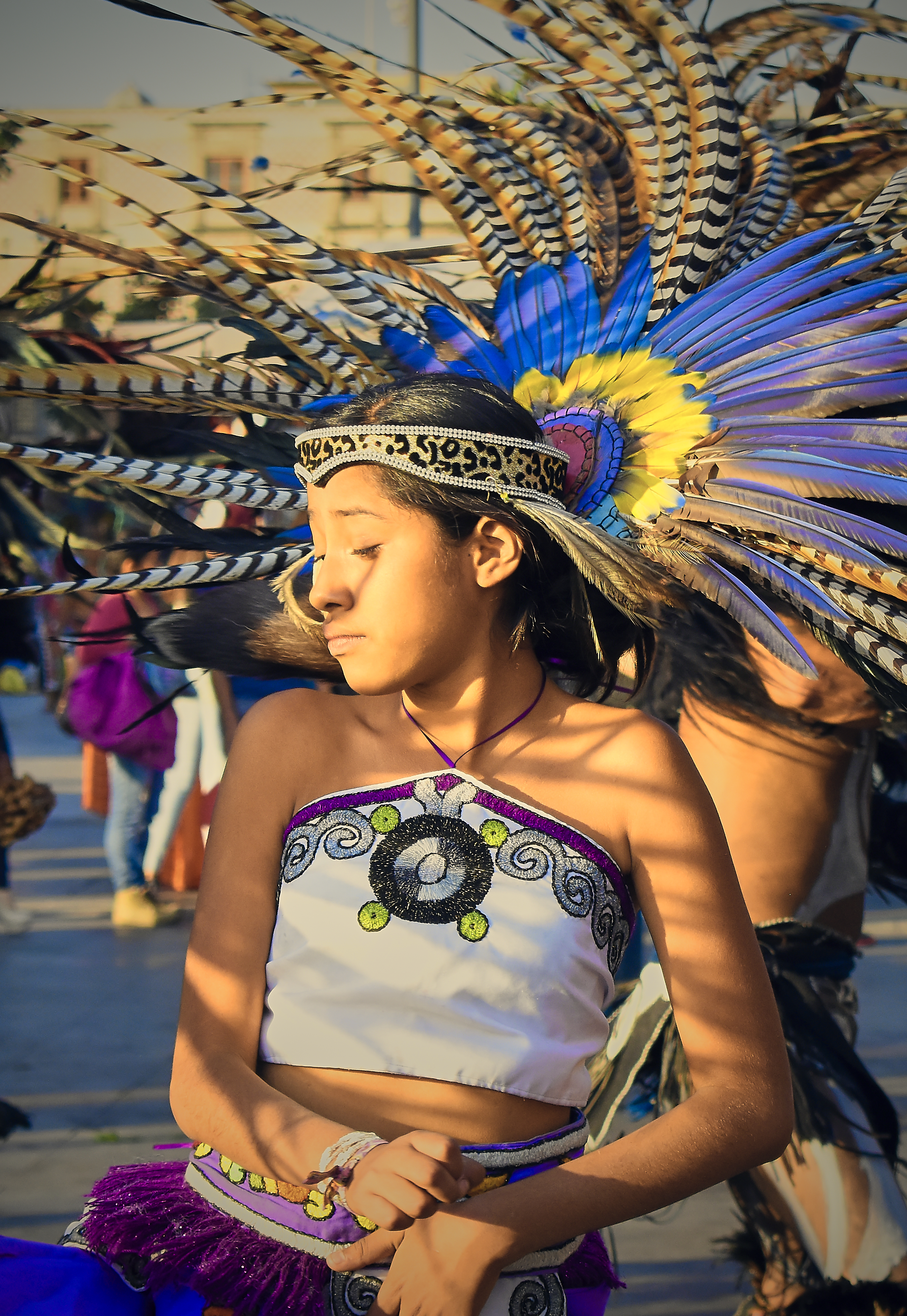 Danza Azteca en el Zócalo de México This photo has been taken in the country: Mexico